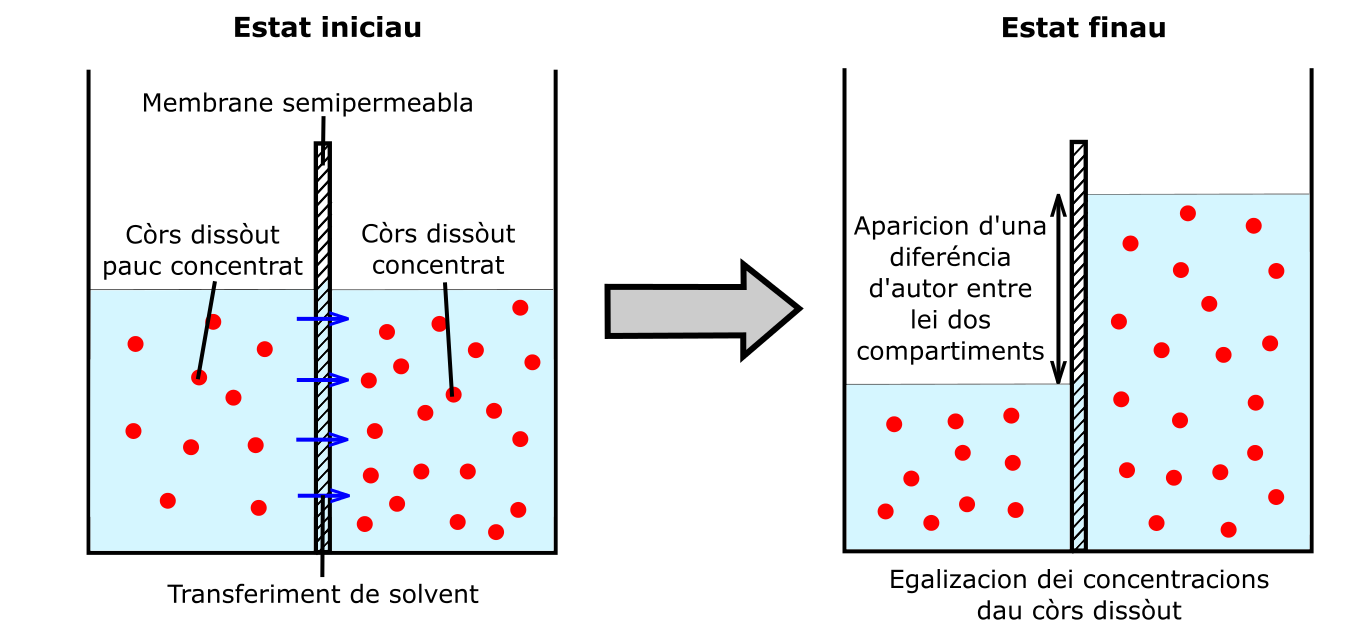 Esquèma generau dau fenomèn d'osmòsi.